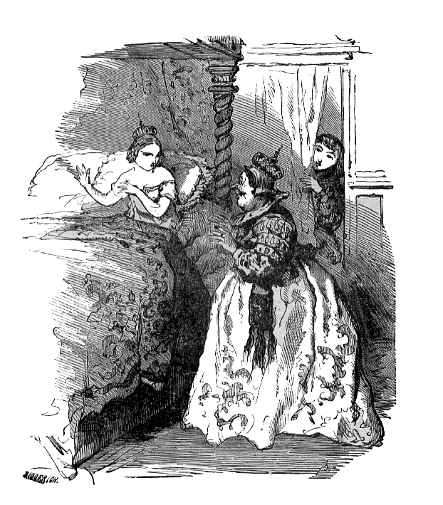 Pour la source voir : Discuter:Contes d'Andersen Vignette de Bertall illustrant le conte La Princesse sur un pois.